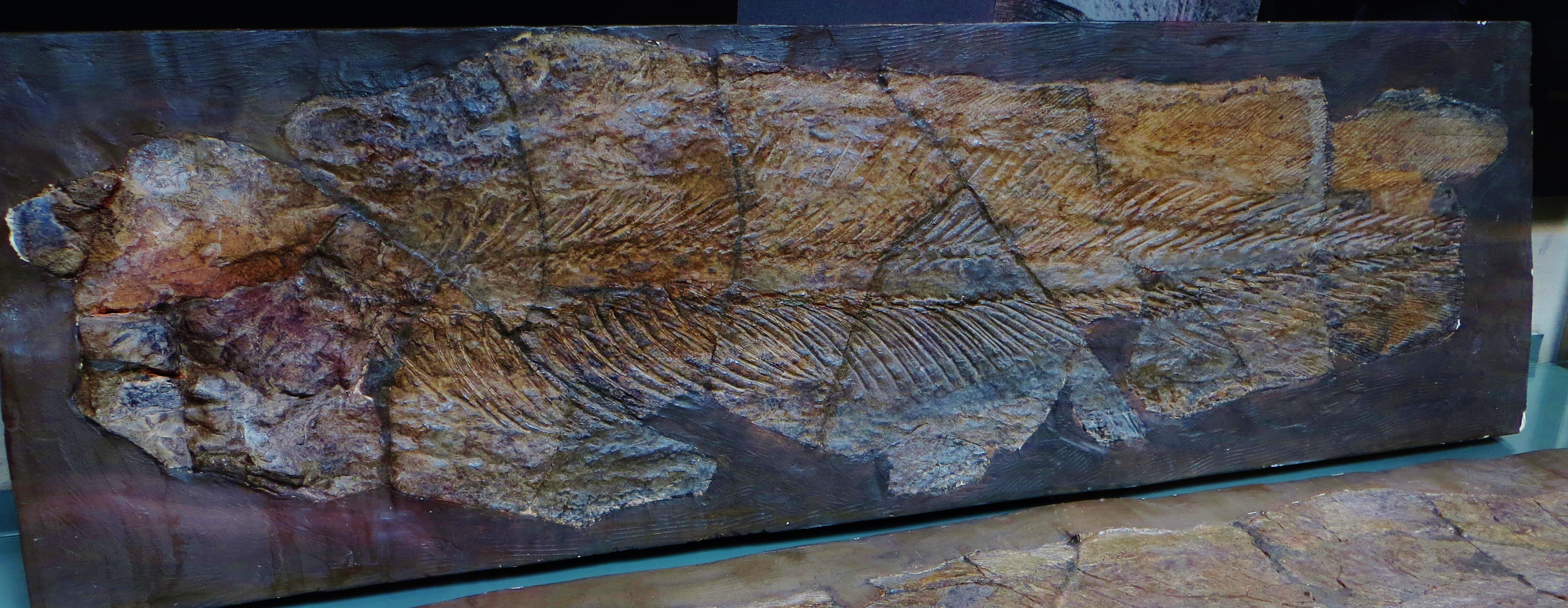 Fossil of Paraceratodus, an extinct fish- Took the photo at Musee d'Histoire Naturelle, Paris